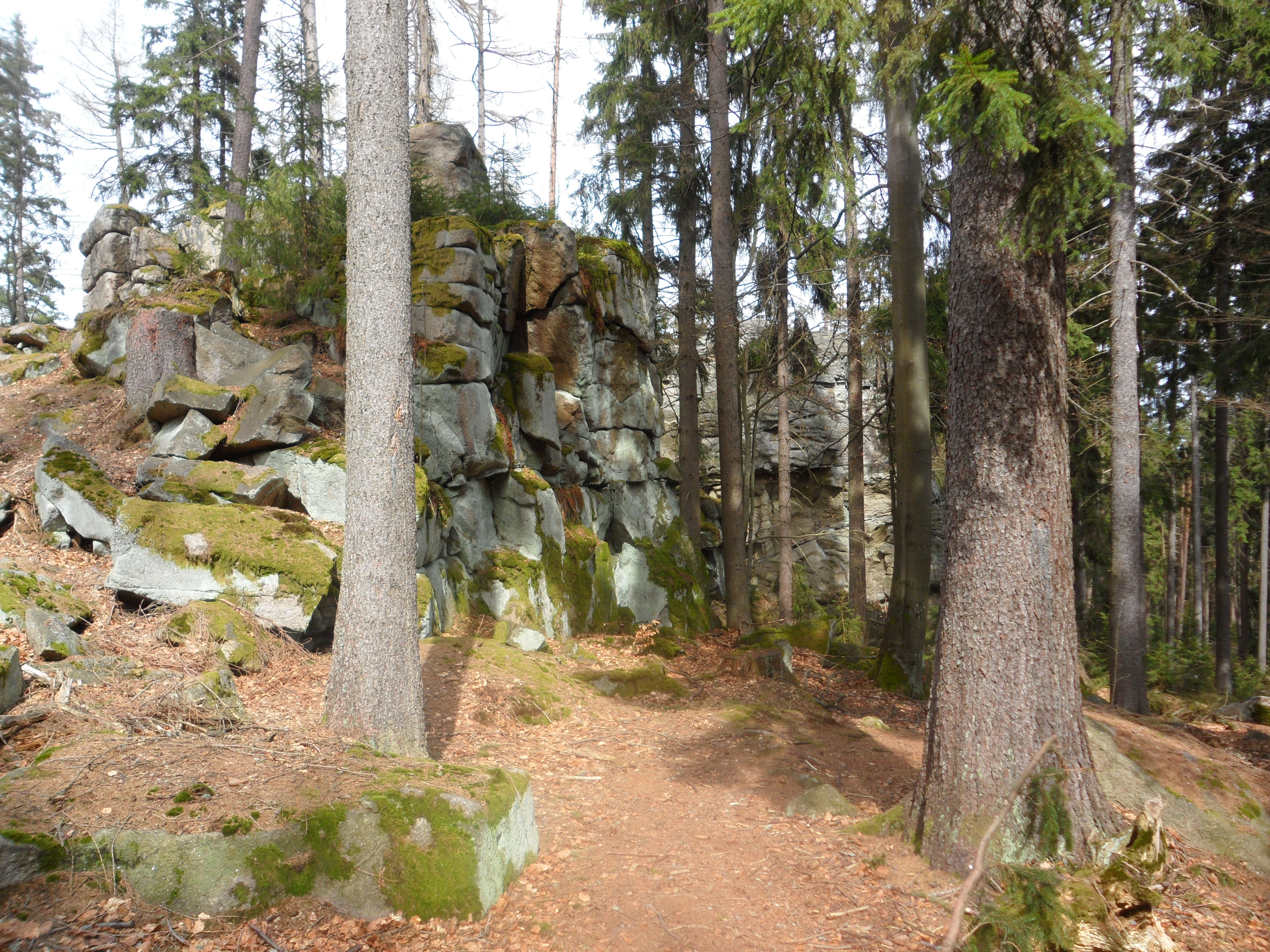 Augsburger Flesen